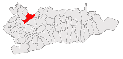 Categorie:Hărţi ale judeţului Călăraşi